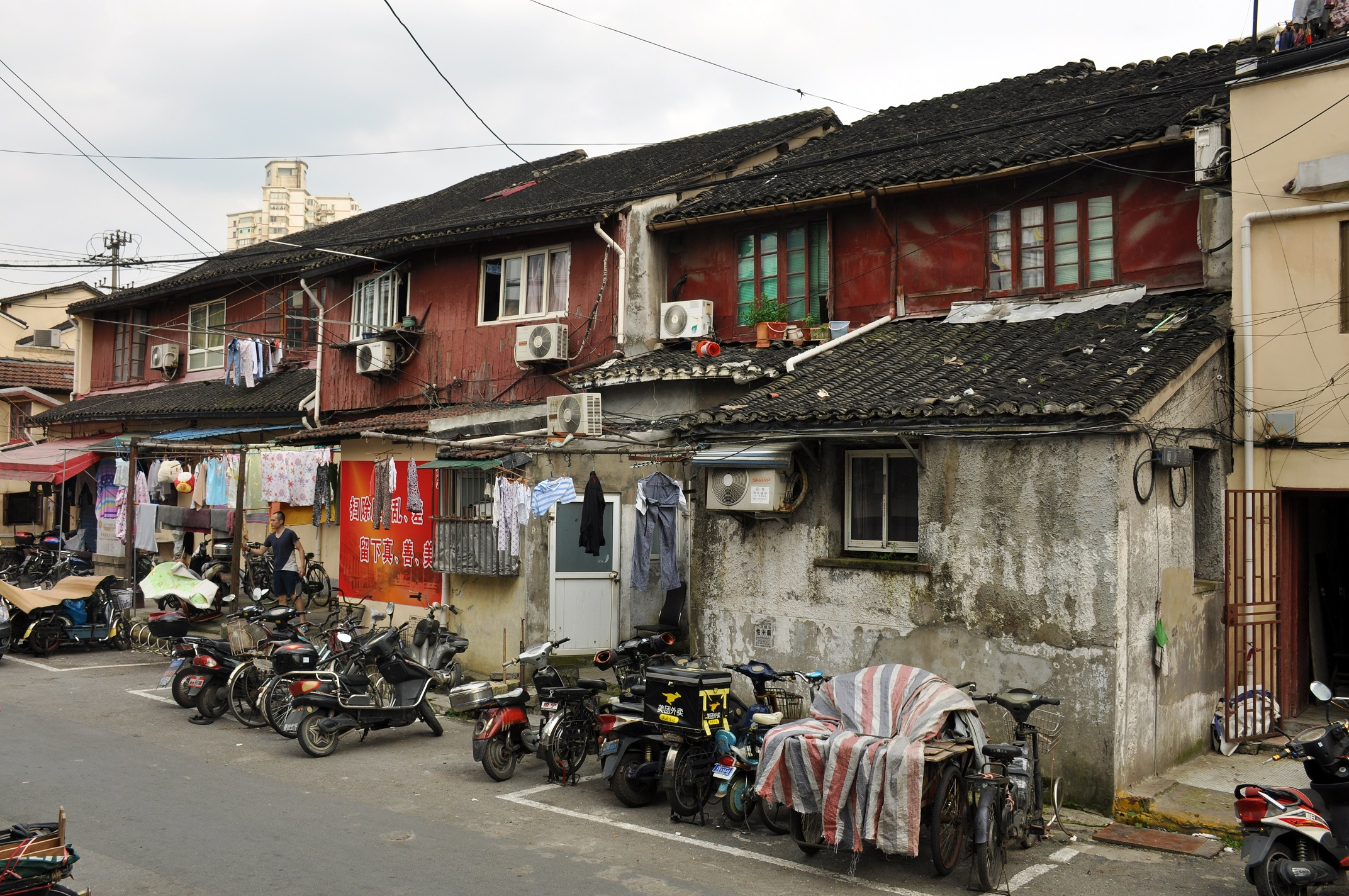 中文（中国大陆）: 徐光启故居——九间楼 乔家路234-244号 明嘉靖四十一年(1562年)